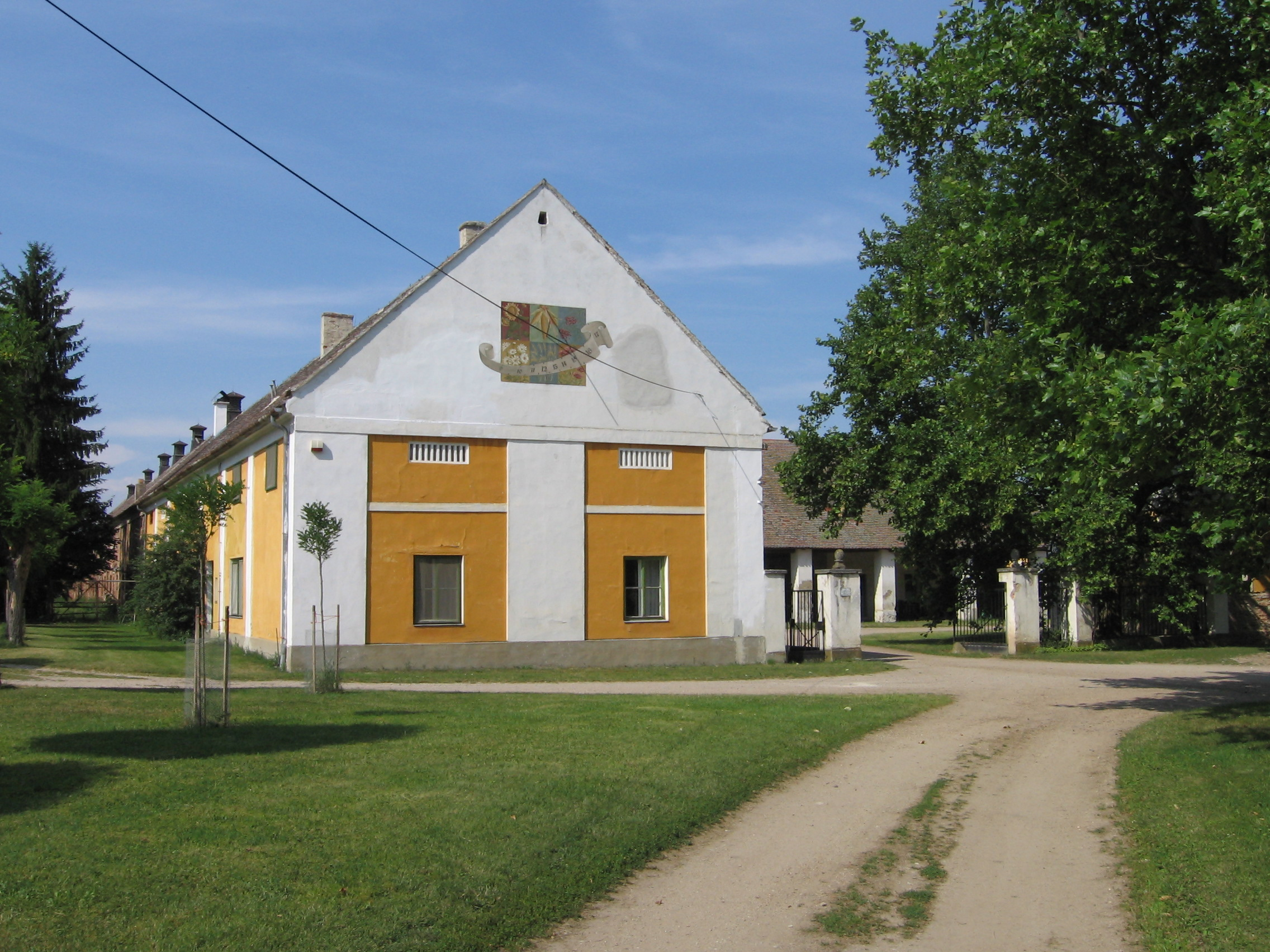 Alt Prerau - hof